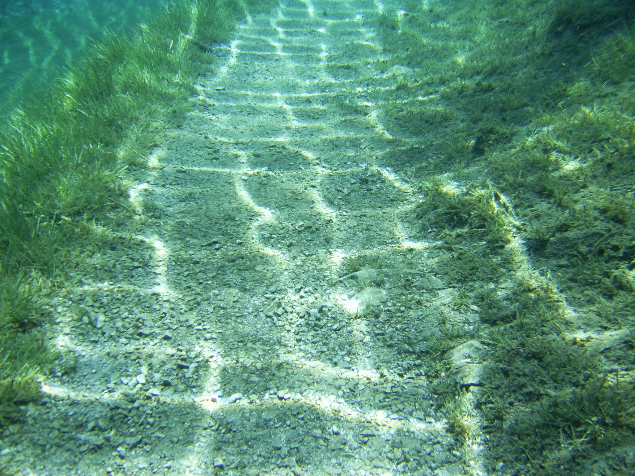 DIGITAL CAMERA 2006 - Grüner See